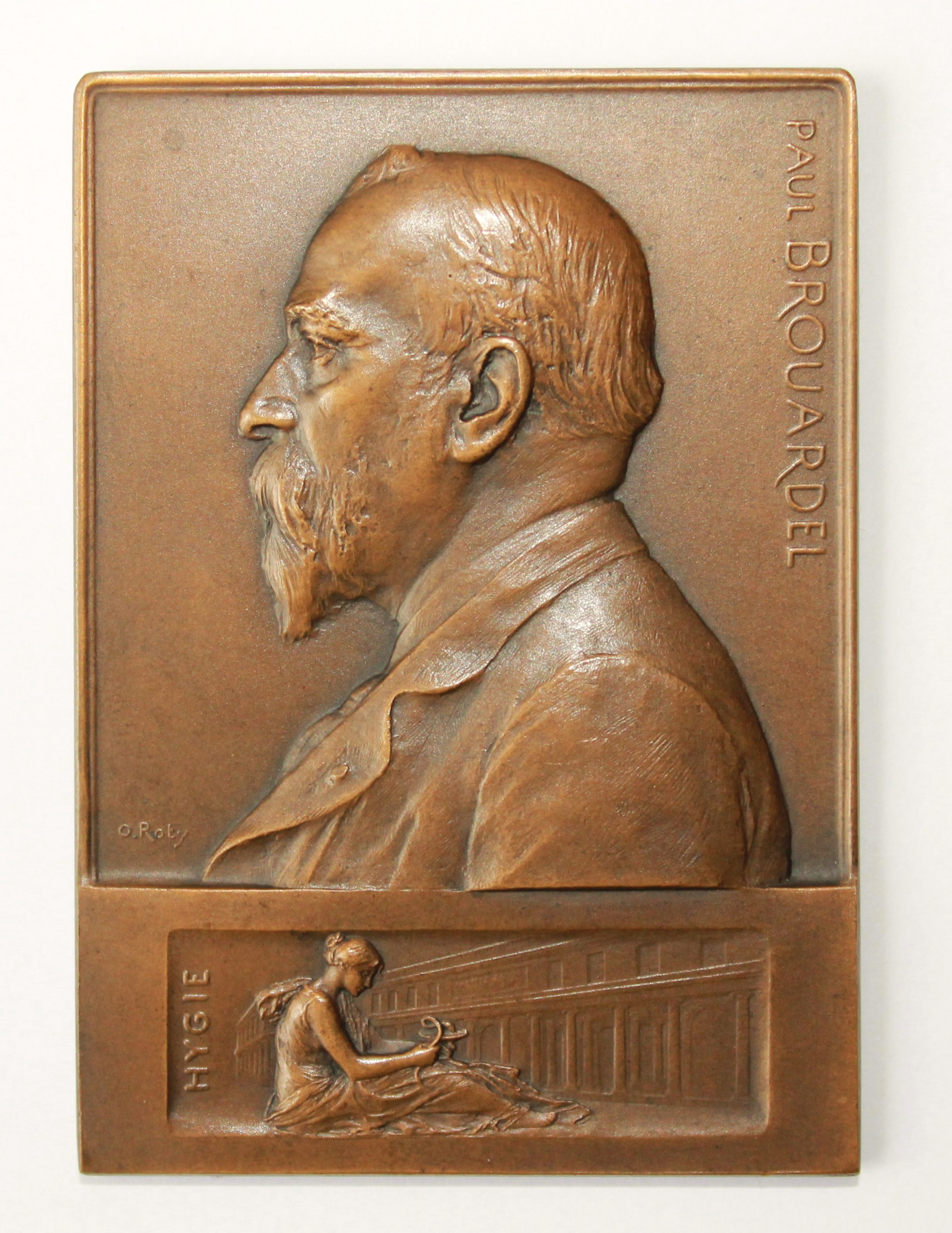 Médaille rectangulaire (70 x 50mm) de Paul Brouardel (1837-1906) réalisée en 1902 par le graveur Oscar Roty.